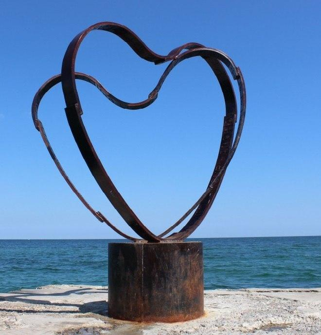 Фото арт об'єкту сонячне серце